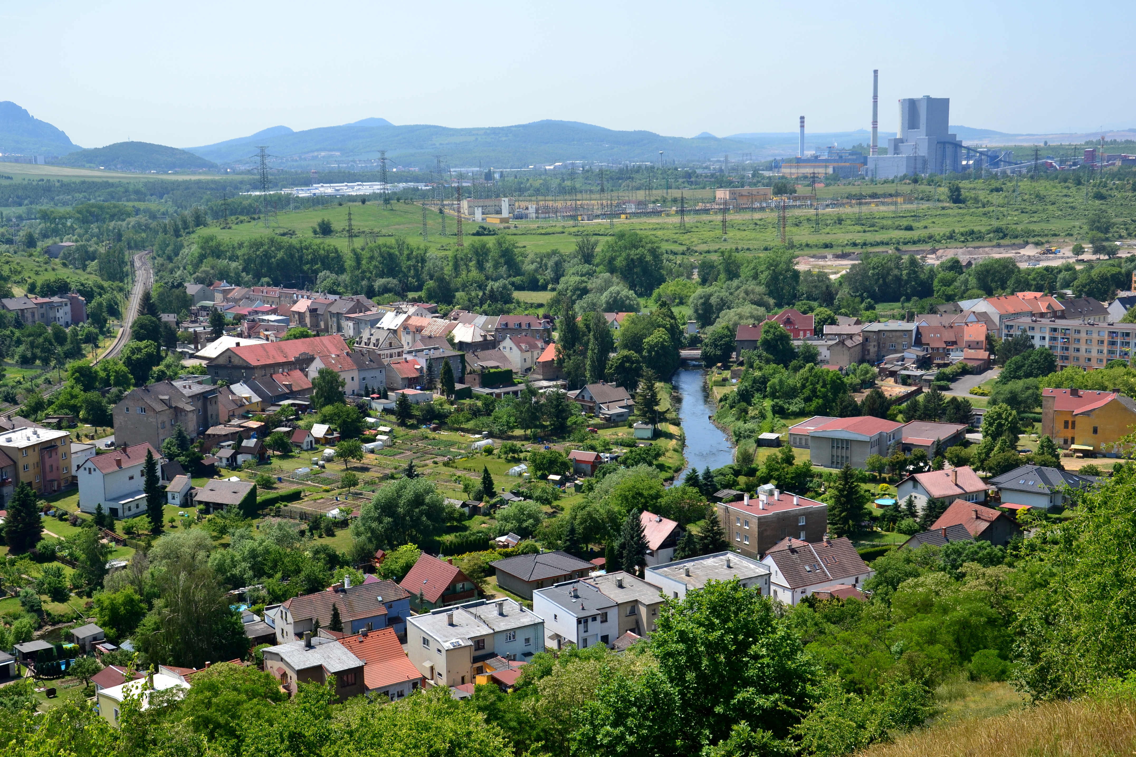 Celkový pohled z Husova vrchu